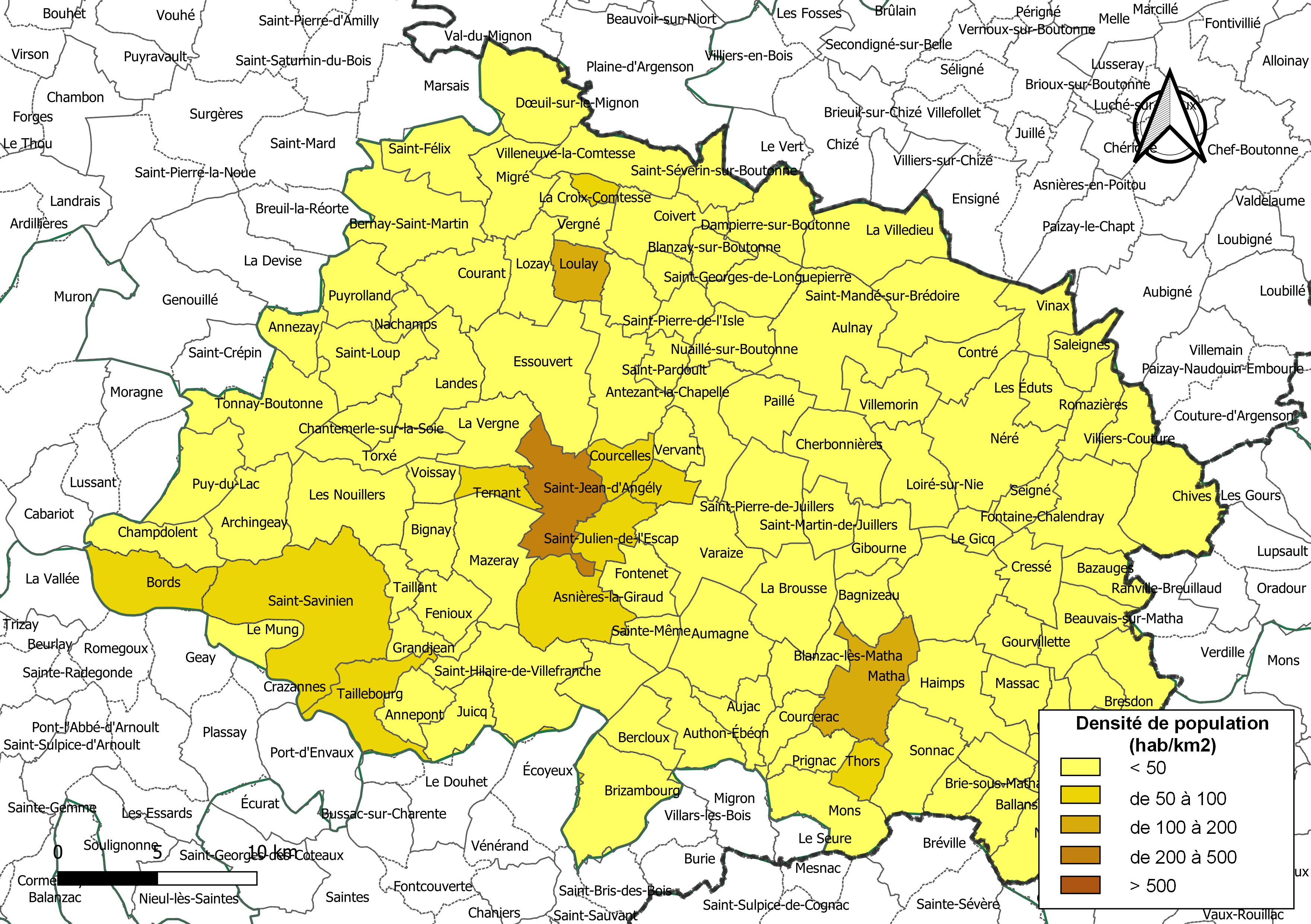 Carte des densités de population (millésimée 2016) des communes de la communauté de communes l'intercommunalité Vals de Saintonge Communauté, département de la Charente-Maritime, France. Composition au 1er janvier 2019.